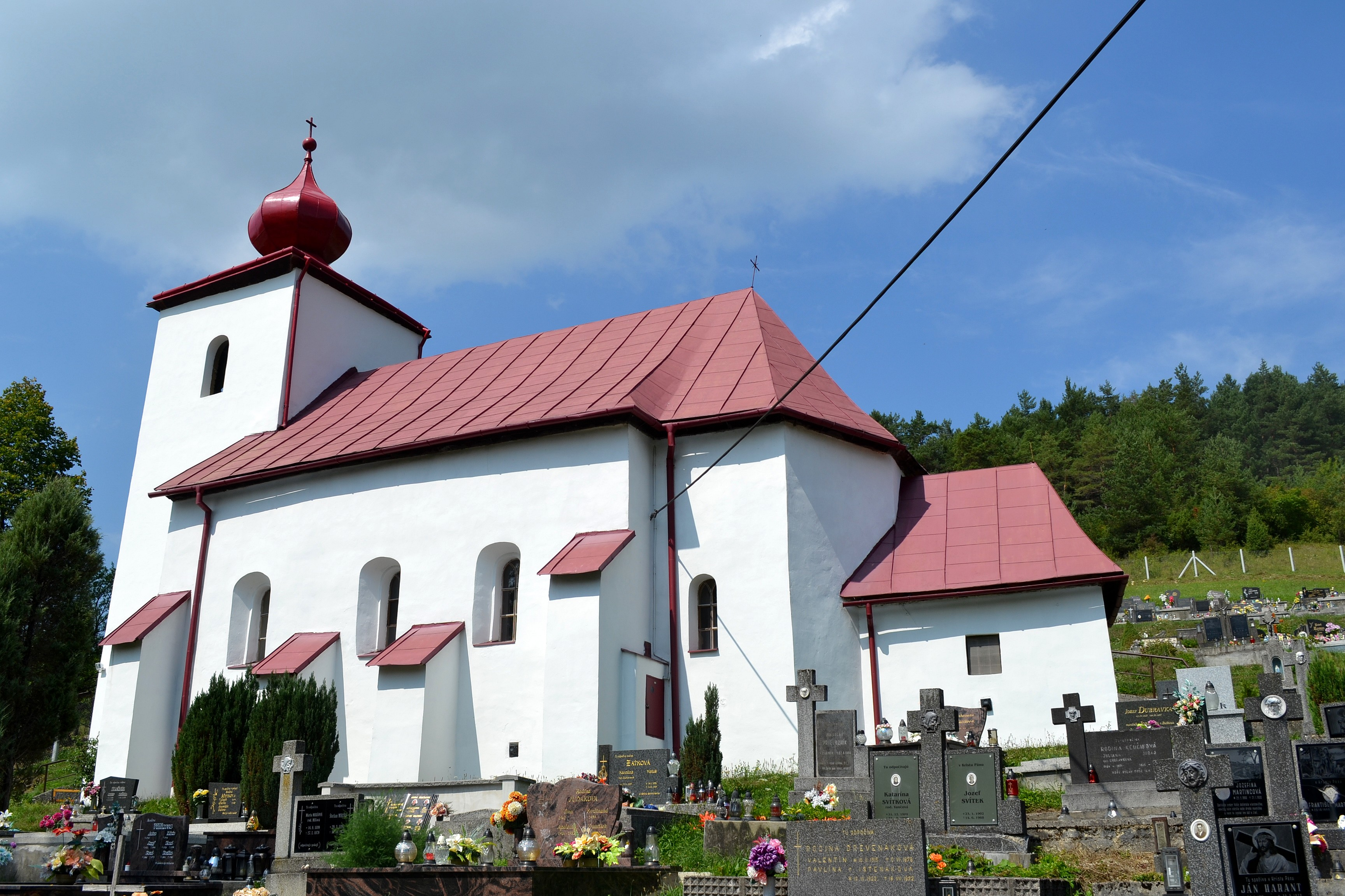 Bodiná (okr. Považská Bystrica), Kostol Panny Márie, Kráľovnej anjelov